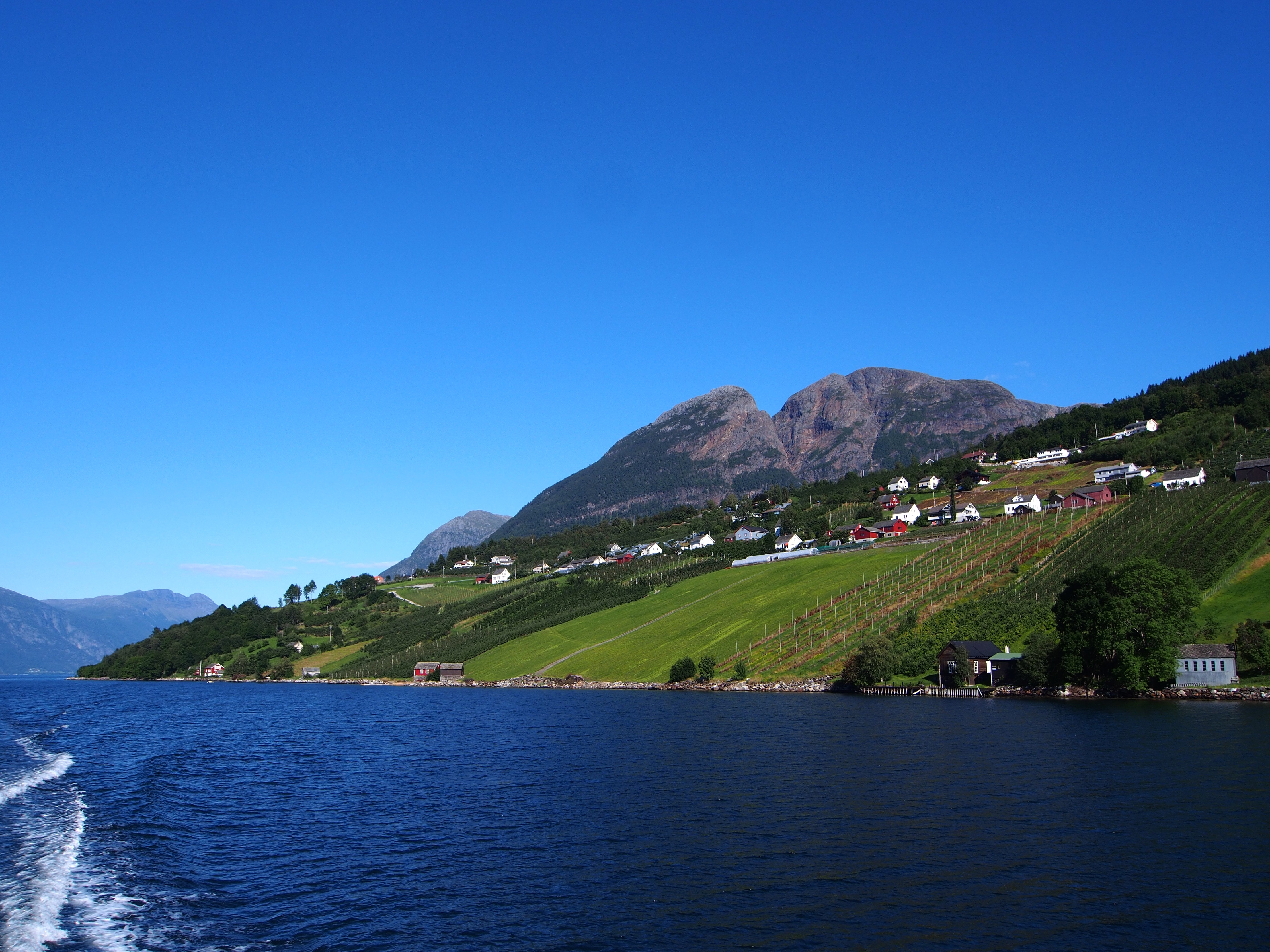 Fruit Farm in Hardangerfjord - 2013.08